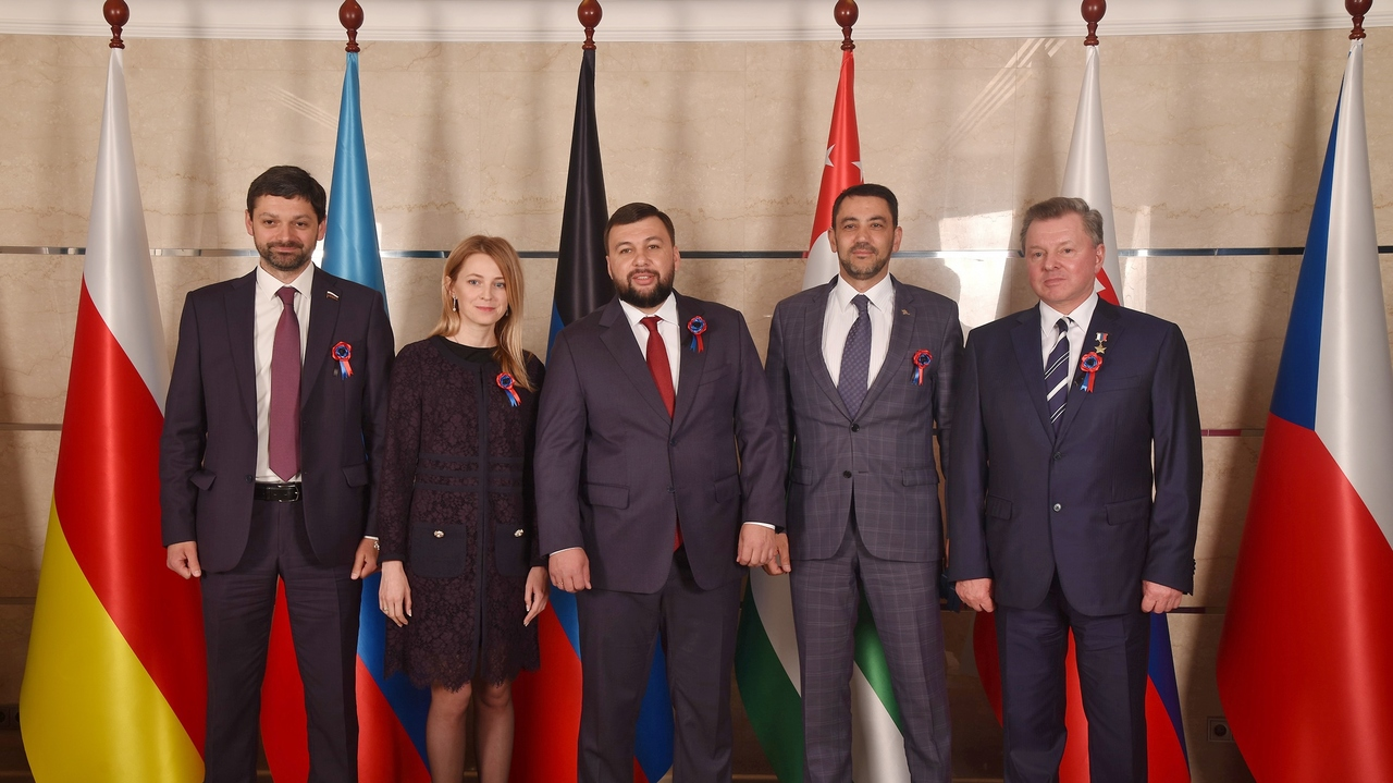 в Донецке состоялись праздничные мероприятия, посвящённых пятилетию Донецкой Народной Республики.